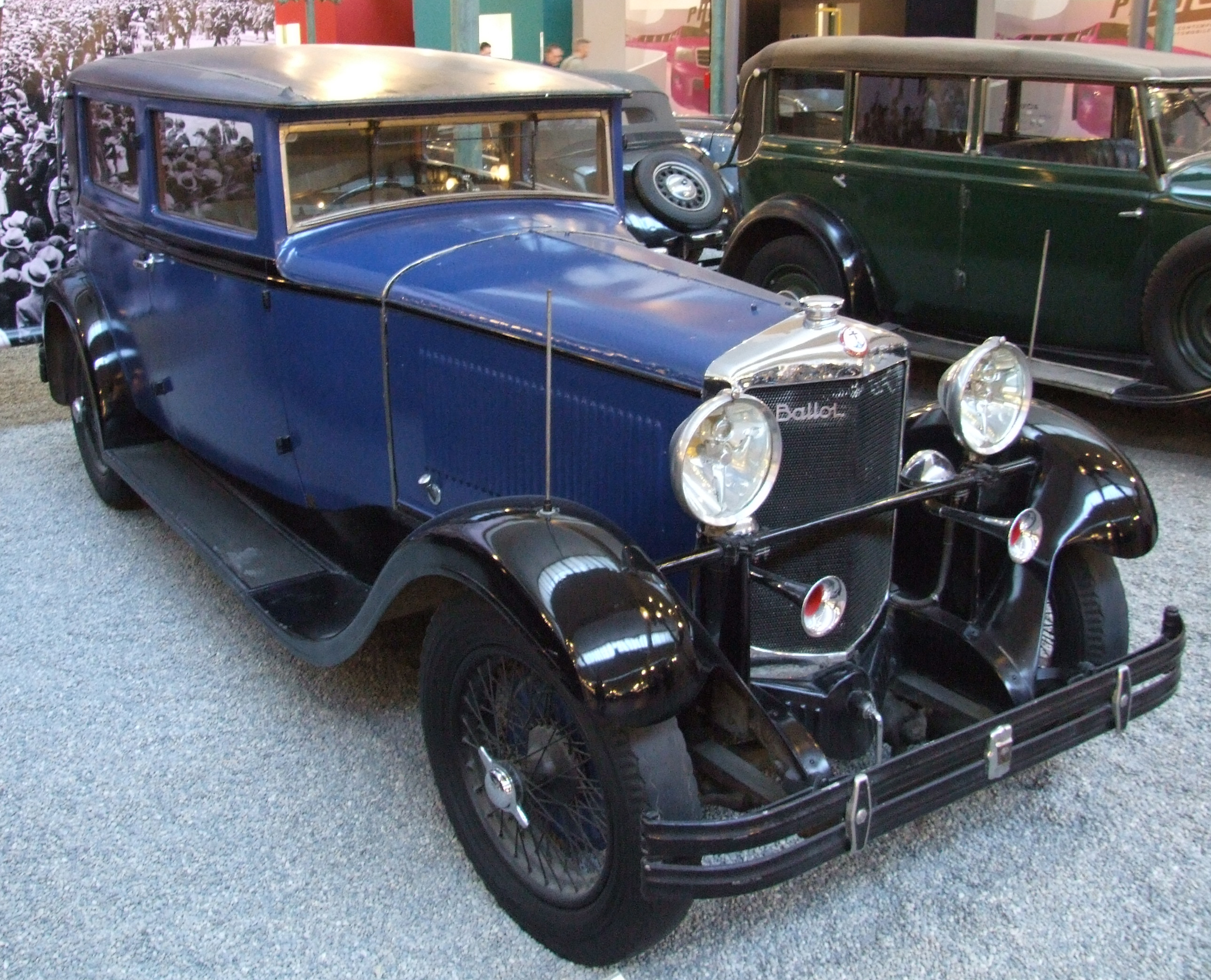 Ballot Berline RH3 von Ballot, 1930, 8 Zylinder, 3049 ccm, 125 km/h, 68 PS (CV, HP), Cité de l’Automobile, Mulhouse